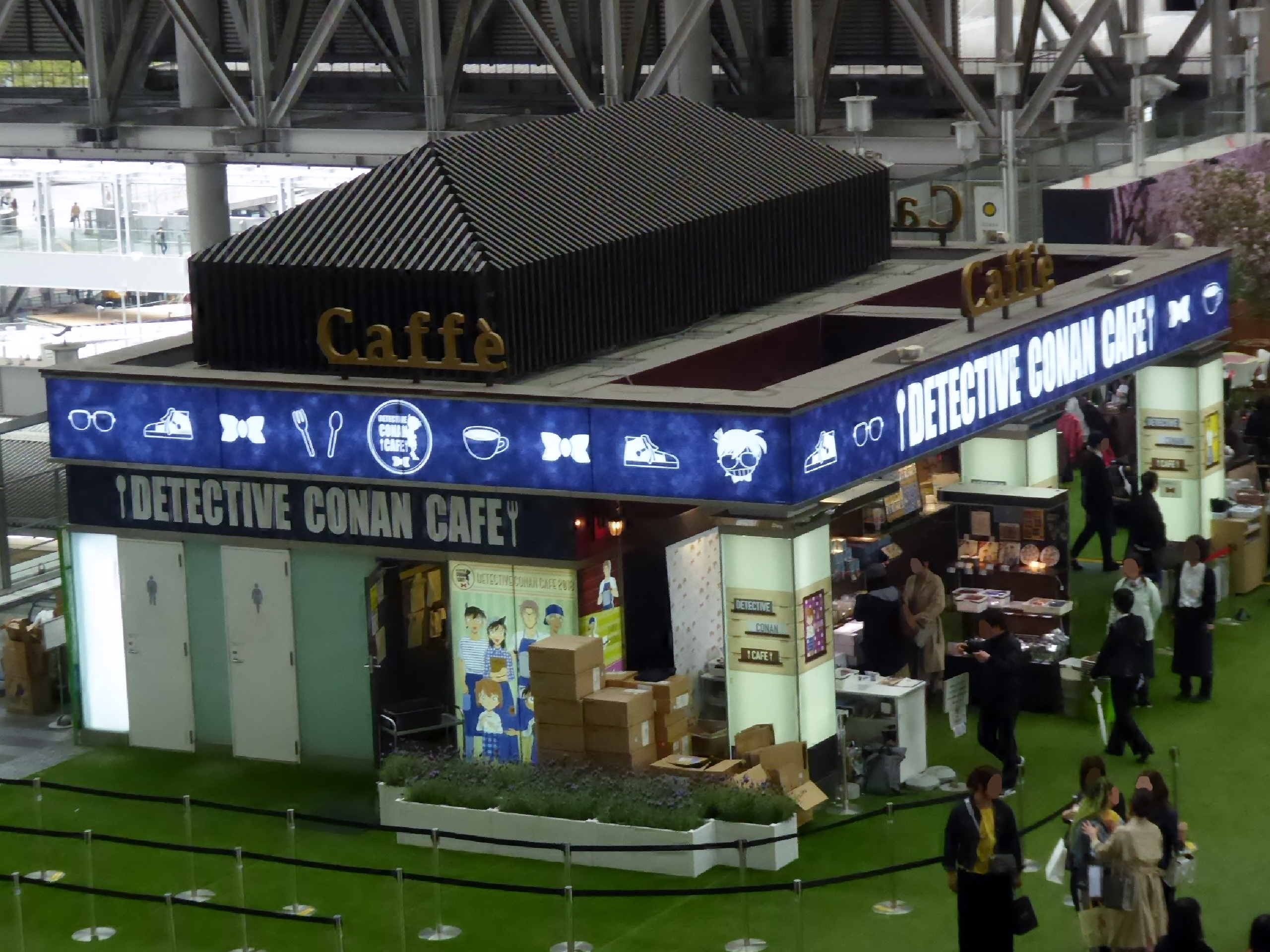 コナンカフェを撮影。